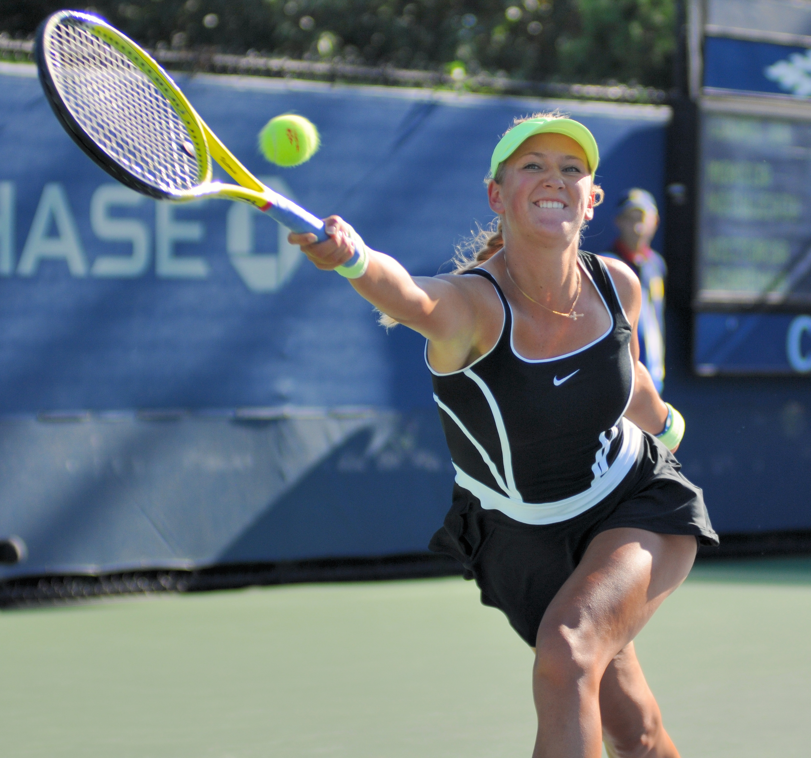 Victoria Azarenka - US Open 2010